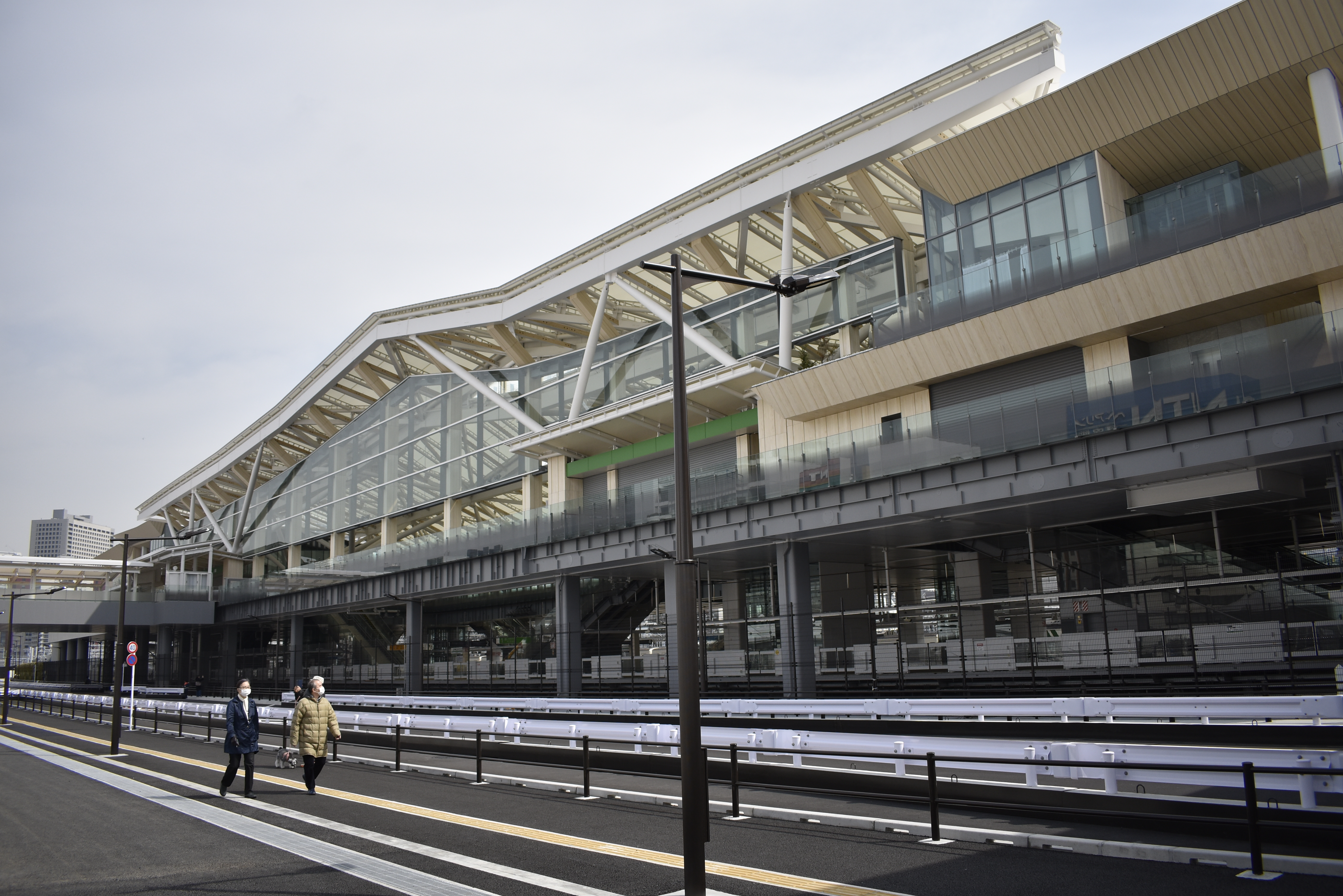 高輪ゲートウェイ駅